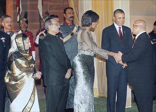 സി പി കൃഷ്ണൻ നായർ US പ്രസിഡന്റിനോടൊപ്പം